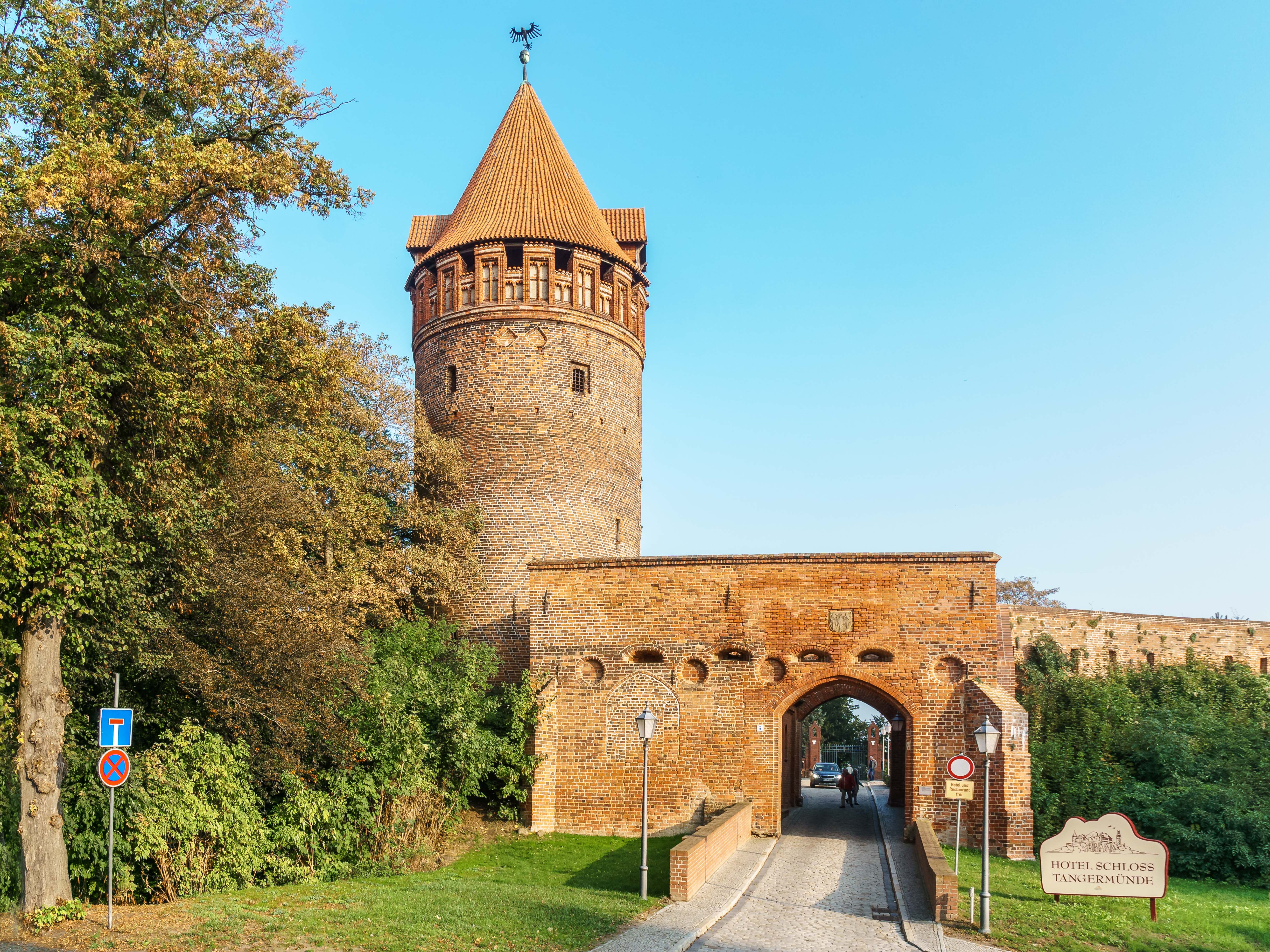 Gefängnisturm mit Burgtor der Burg Tangermünde